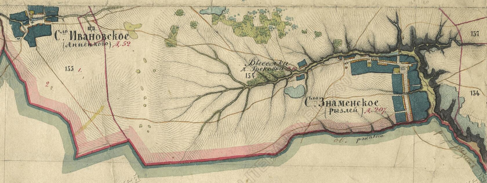 Село Знаменское (Рызлей) на одноверстной карте Менде Симбирской губернии 1861 г.